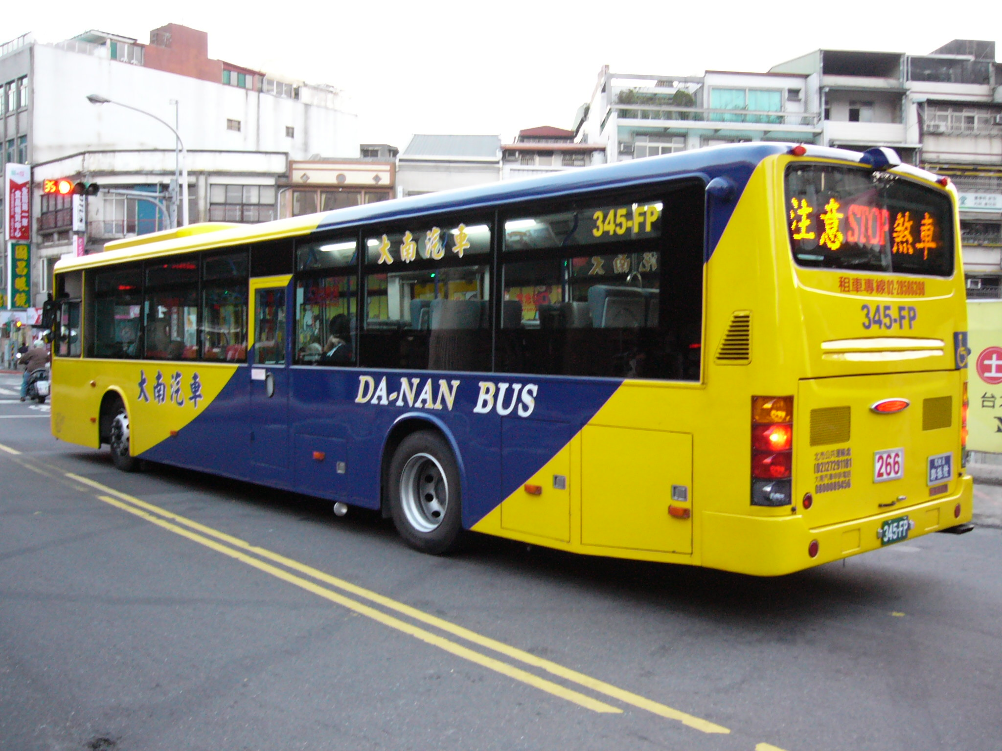 大南汽車的Daewoo BS120CN-4大客車，車號為345-FP